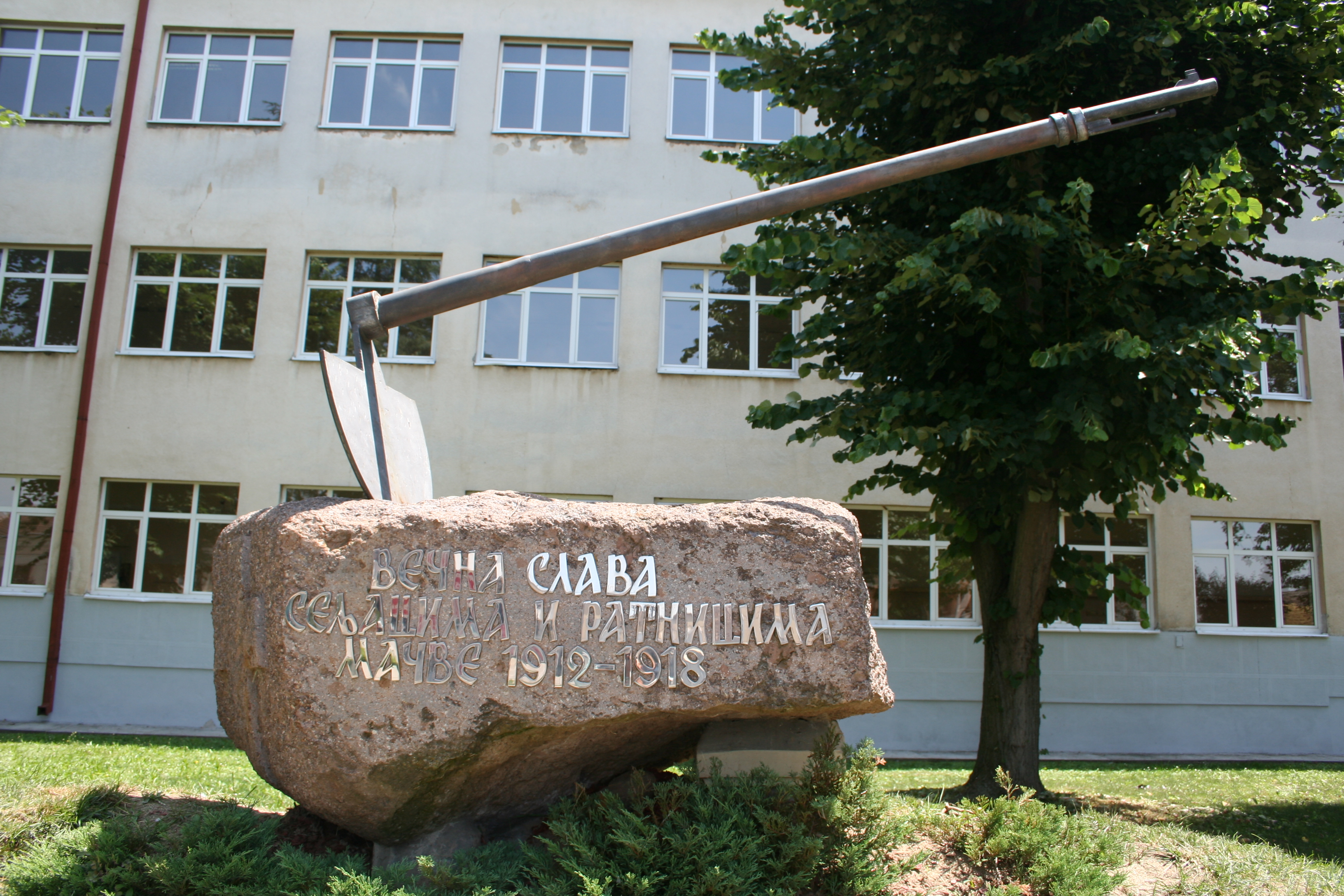 Spomenici ispred osnovne škole, Bogatić